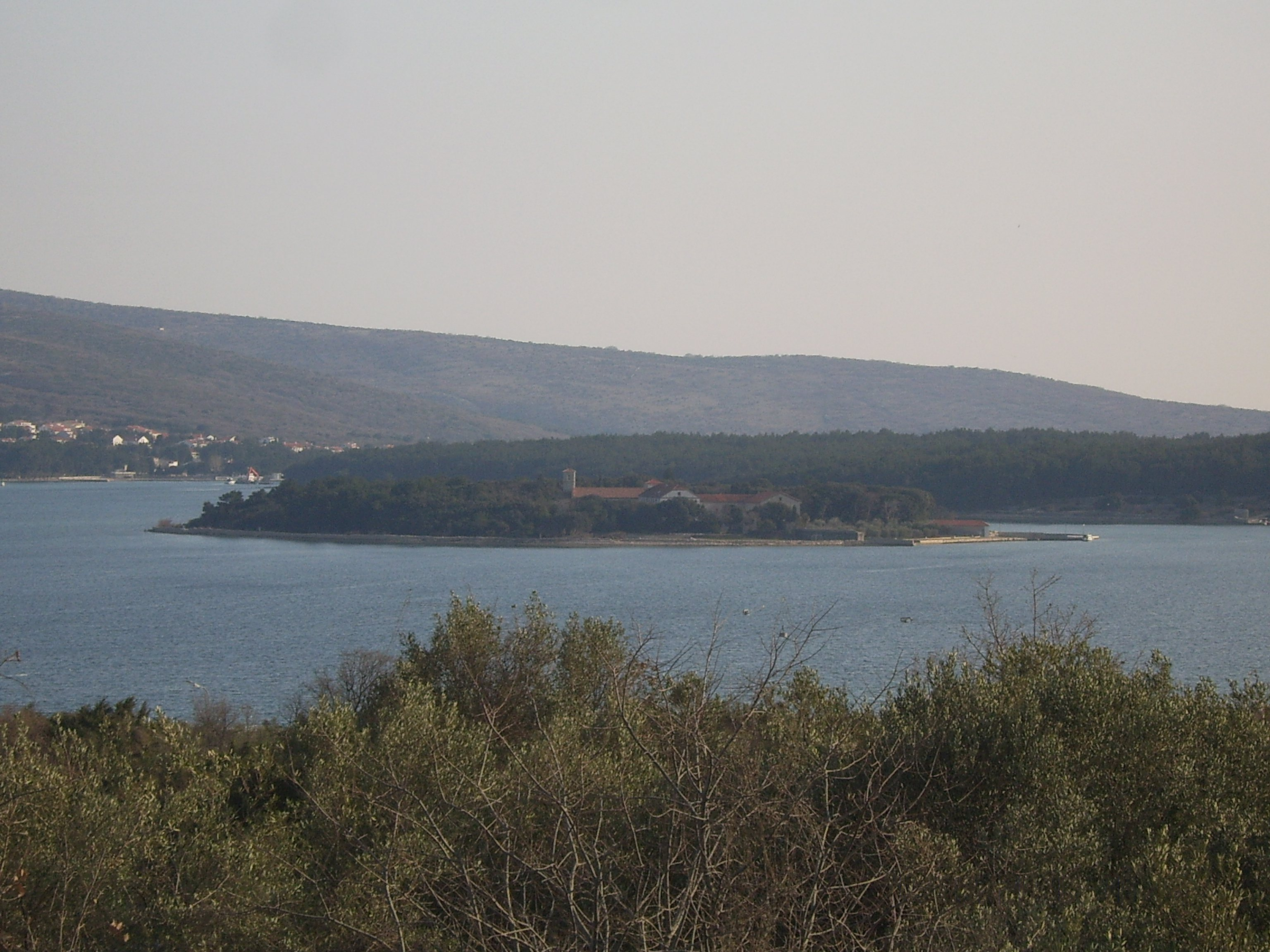 Otočić Košljun u Puntarskoj dragi slikan iz Kornića. U pozadini, lijevo, se djelomično vidi mjesto Punat, a desno poluotok Prniba